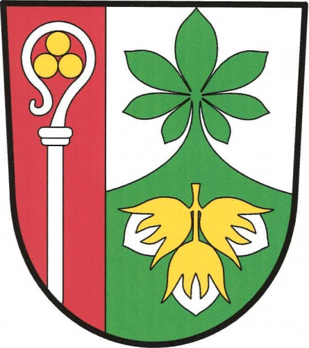 Lískovice (okres Jičín), znak obce. Červeno-stříbrně vpravo polcený štít. V pravém poli vyrůstající stříbrná berla se třemi (1, 2) zlatými koulemi v závitu. V levém poli zelený vydutý hrot zakončený listem jírovce. V hrotu tři svěšené stříbrné oříšky na zlaté stopce.